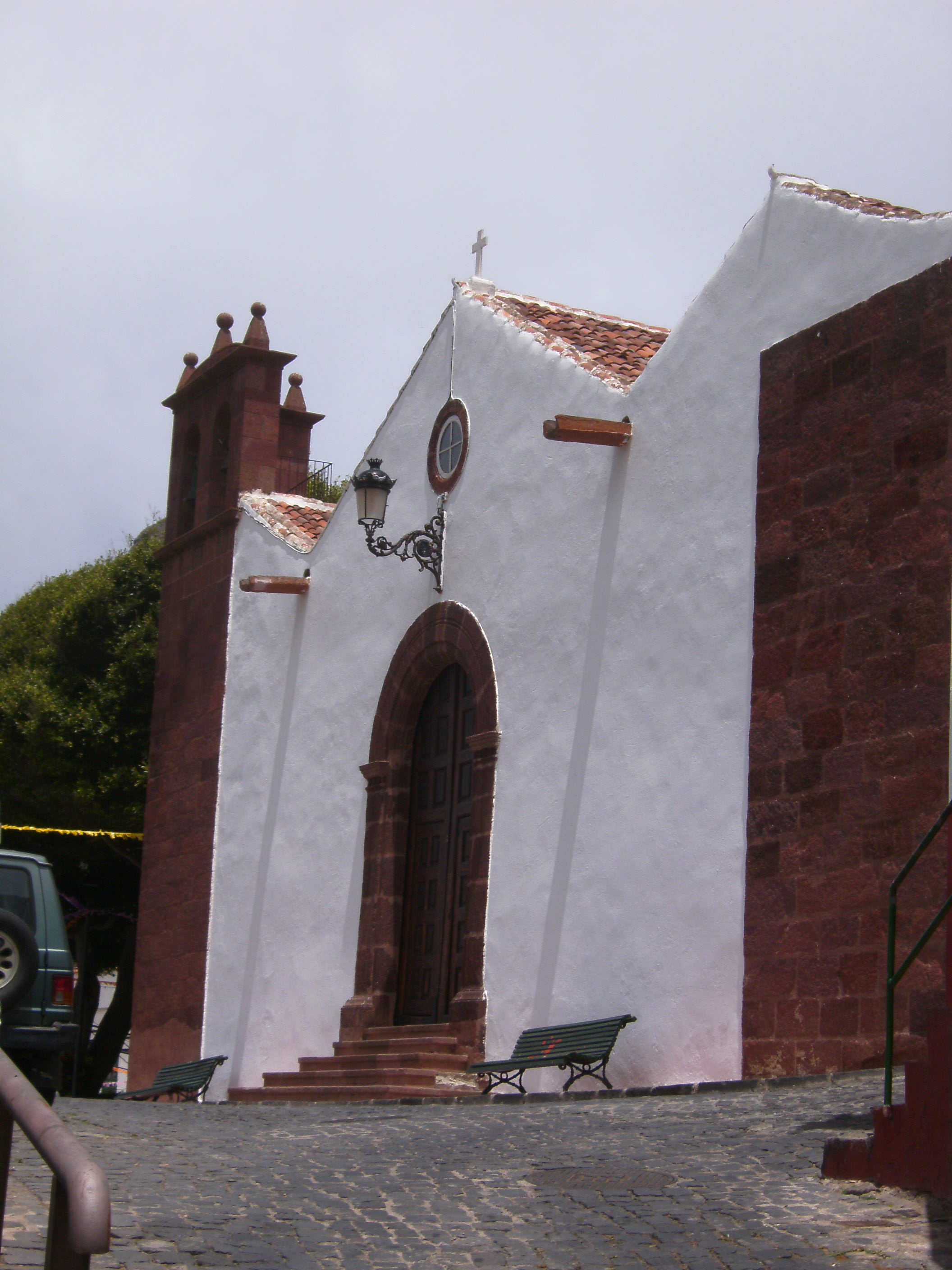 Iglesia de Nuestra Señora de las Nieves, Taganana (Tenerife).